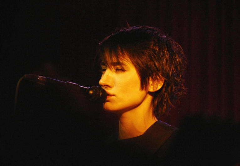 Russian singer Zemfira (Земфира, новогодняя вечеринка в клубе «16 тонн»)